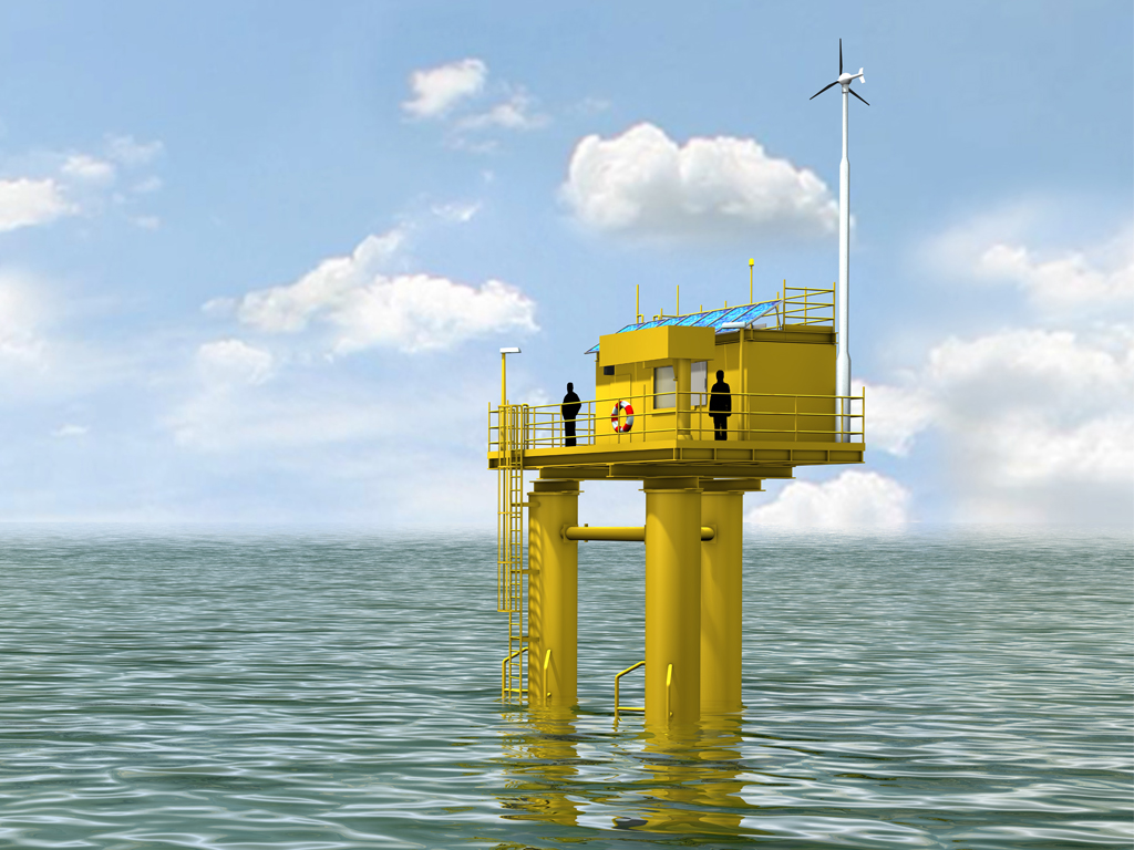 Forschungsplattform am Riff Nienhagen, Stand September 2010.